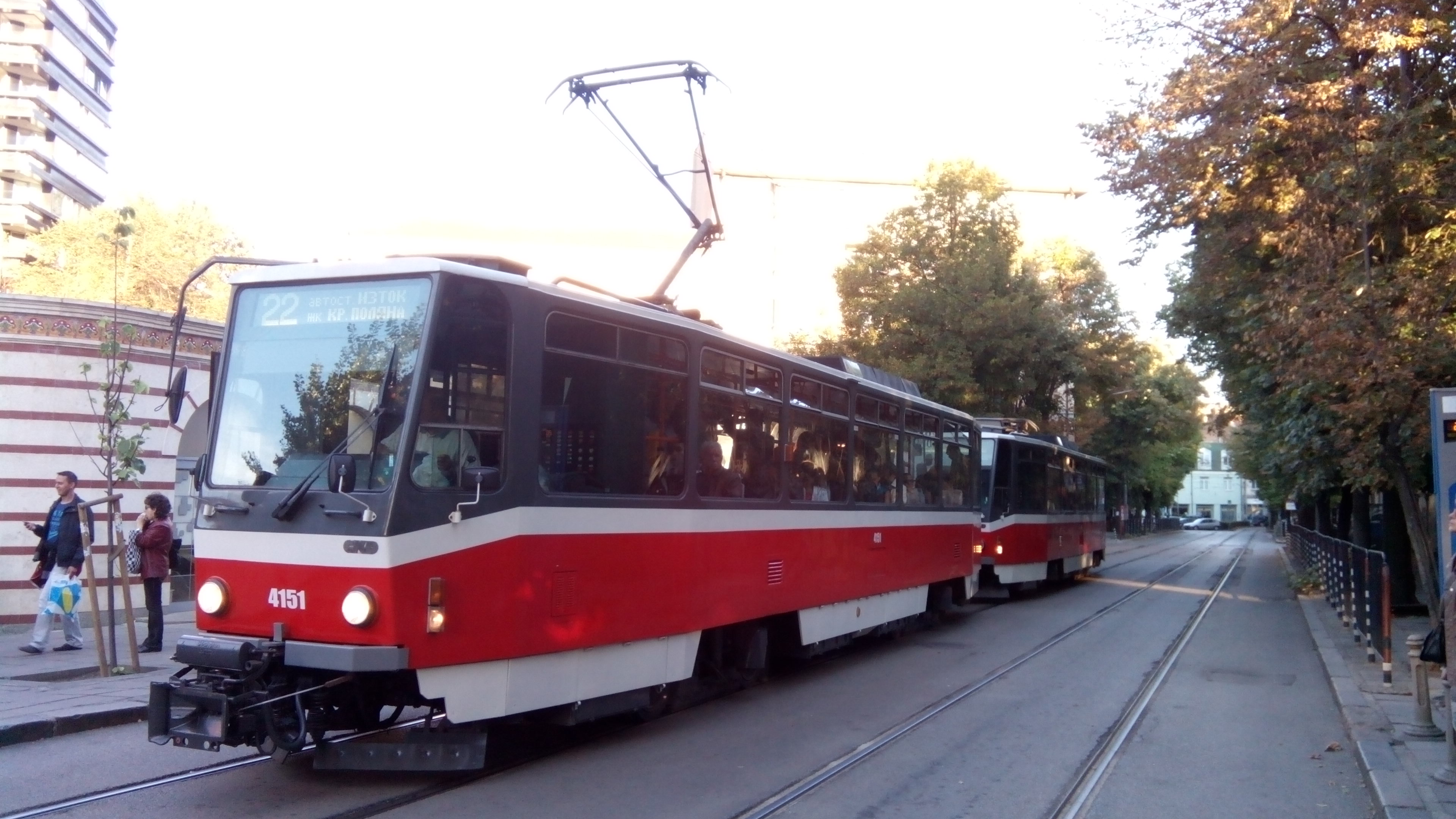 Straßenbahn Tatra T6A5 in Sofia